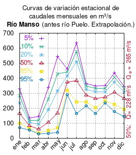 Curvas de variación estacional del río Manso antes de junta con río Puelo. # Dirección General de Aguas # Santiago de Chile # Ministerio de Obras Públicas (Chile) # Análisis de metodología y determinación de cuadales de reserva turísticos # url: # CUADRO 6.2-7 CAUDALES MEDIOS MENSUALES EN ESTACIÓN FLUVIOMÉTRICA RÍO MANSO ANTES JUNTA CON RÍO PUELO, pág. 166 mes 5% 10% 20% 50% 85% 90% 95% ene 329.5 283.6 235.8 163.6 99.4 87.1 70.3 feb 133.9 120.9 107.1 85.3 65.1 61.2 55.8 mar 144.5 118.3 93.4 60.5 36.7 32.8 27.8 abr 340.2 262.2 191.7 105.8 51.4 43.4 33.8 may 544.7 429.8 317.4 168.7 70.1 56.1 39.7 jun 459.8 440.8 417.7 373.4 319.6 307.2 289.0 jul 634.7 576.7 508.5 384.6 243.3 211.6 165.9 ago 365.8 348.0 326.9 287.6 241.1 230.4 214.8 sep 349.6 332.0 309.8 264.5 203.5 188.1 164.8 oct 353.2 331.0 308.3 274.8 246.8 241.7 235.3 nov 435.4 407.0 372.6 306.9 226.0 206.9 178.6 dic 344.9 330.3 310.4 265.1 194.9 175.8 145.6